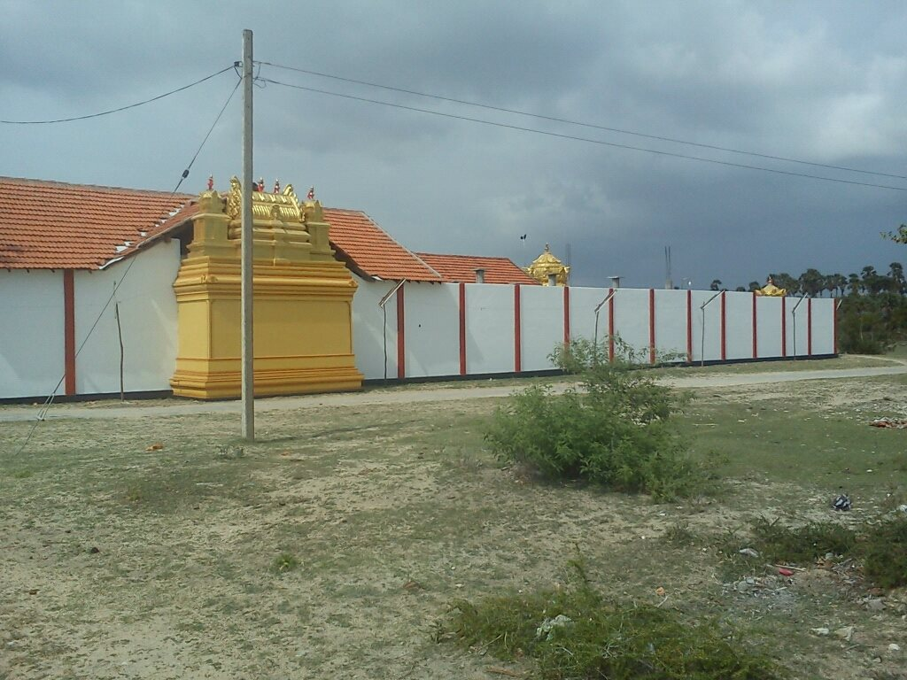 பின்புறம்